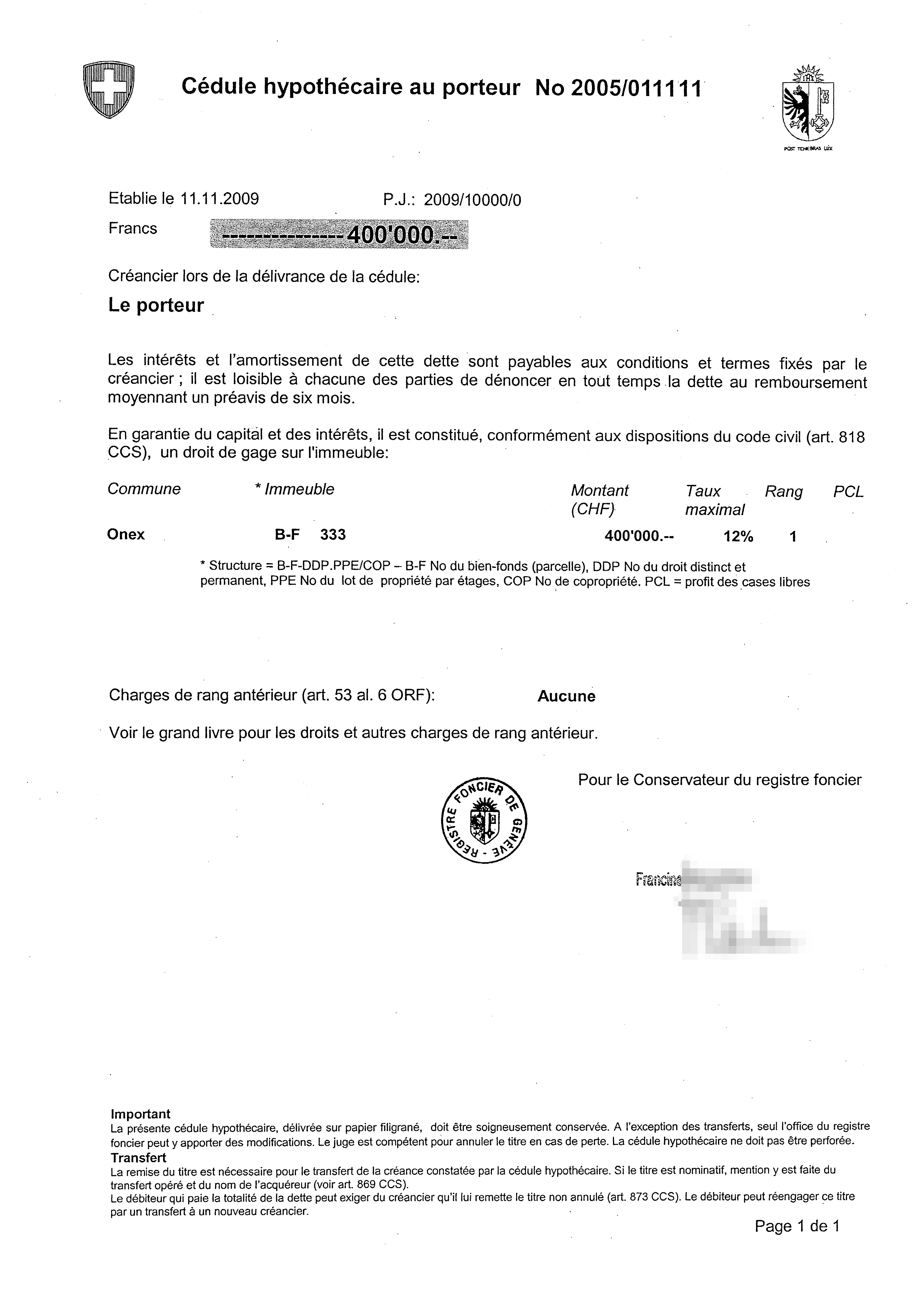 Cédule hypothécaire, émise par le registre foncier du Canton de Genève, en garantie d'un prêt immobilier. Le contenu de la cédule a été anonymisé; les informations indiquées ne correspondent donc plus à un immeuble réel.